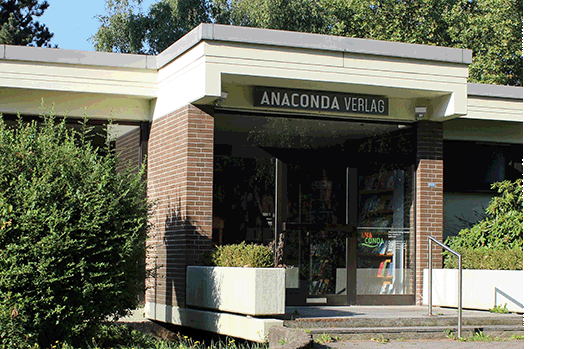 Foto vom Verlag / Verlagsgebäude